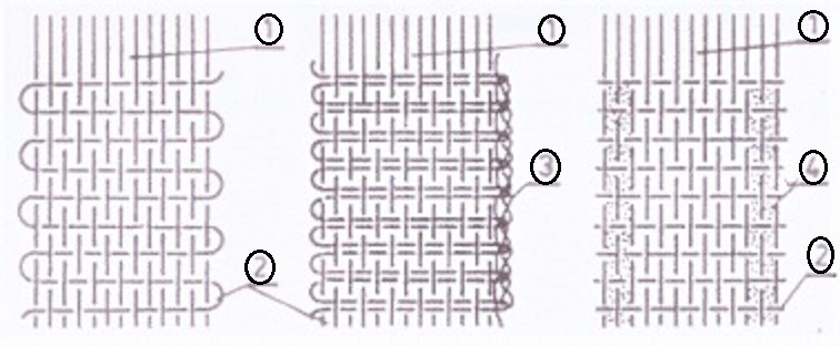 Stuha z různých tkacích strojů: člunkový stuhařský (vlevo), jehlový stuhařský (uprostřed), vyříznutá ze široké tkaniny (vpravo)